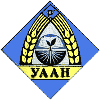 Эмблема Украинской академии аграрных наук